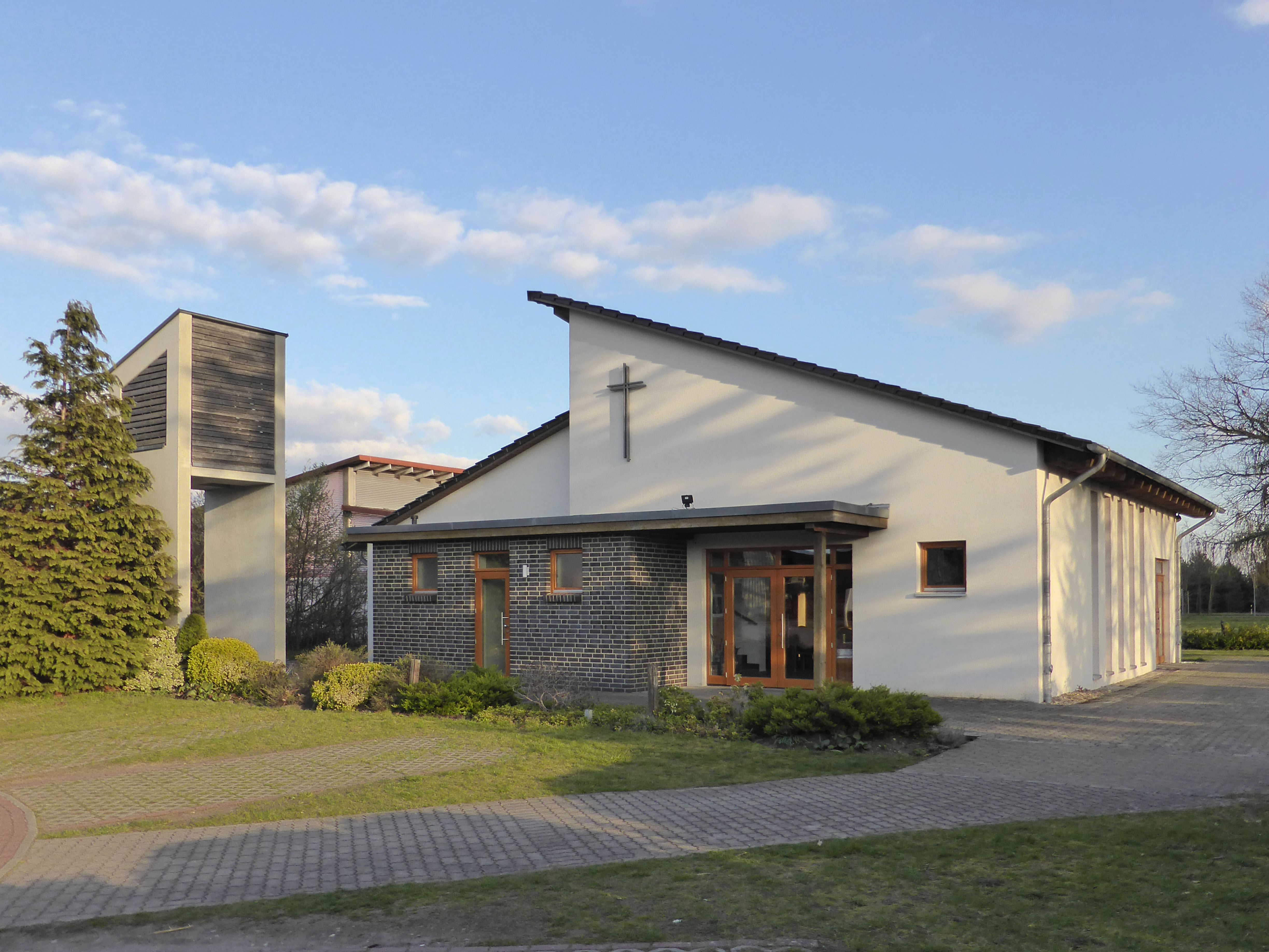 Evangelisch-lutherische Kirche in Grußendorf (Sassenburg).